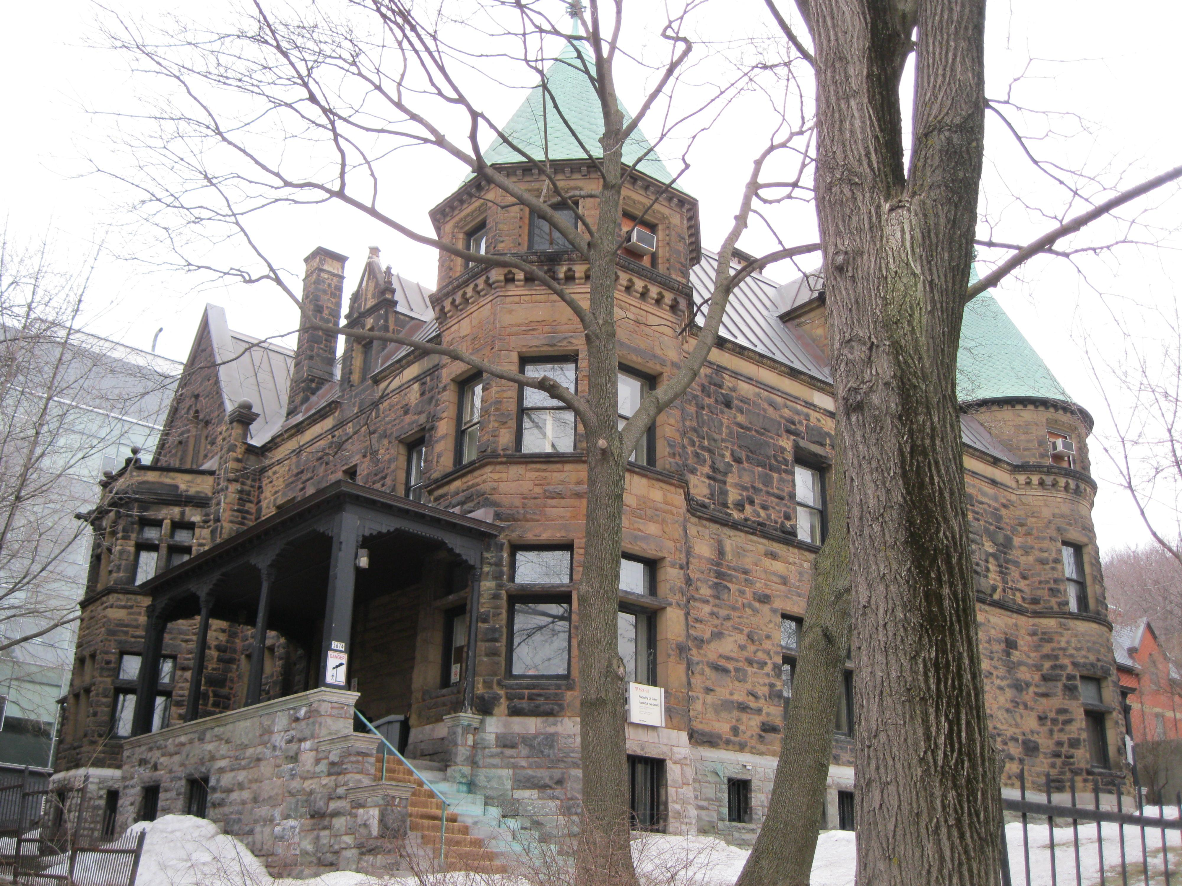 McGill University downtown campus